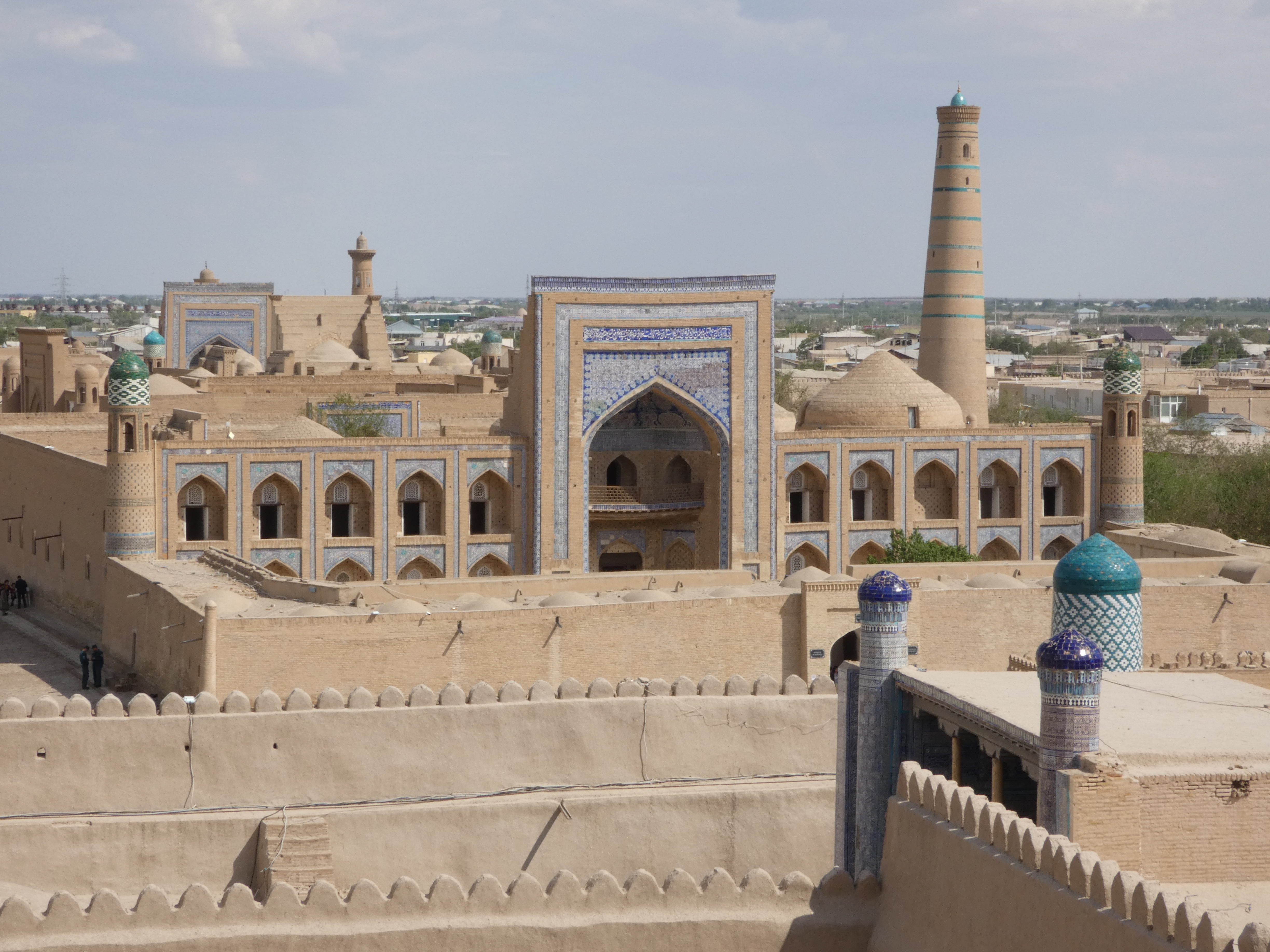 Medrese Muhammad Rahim Khan, Chiwa, vom Turm des Konya Ark fotografiert